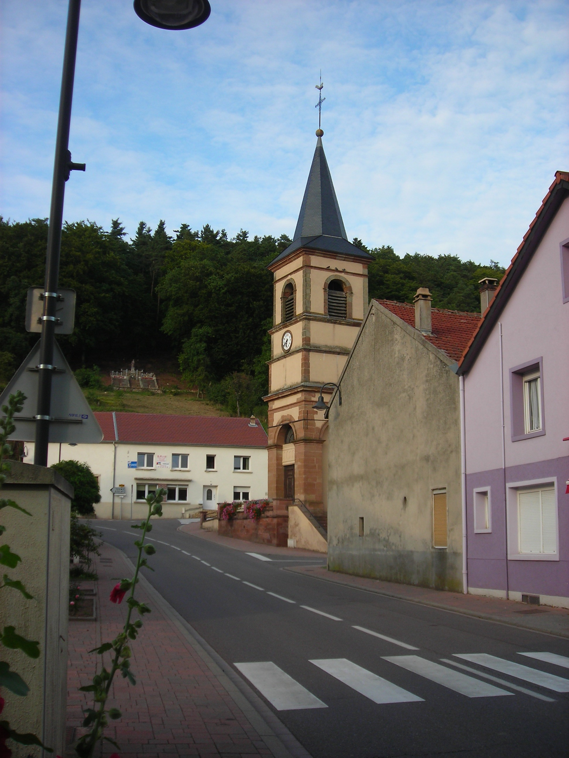 Eglise de Guerting (57 France)